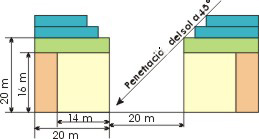 Evolució de l'alçada dels edificis a l'eixample de Barcelona. Dibujo realizado por Josemanuel